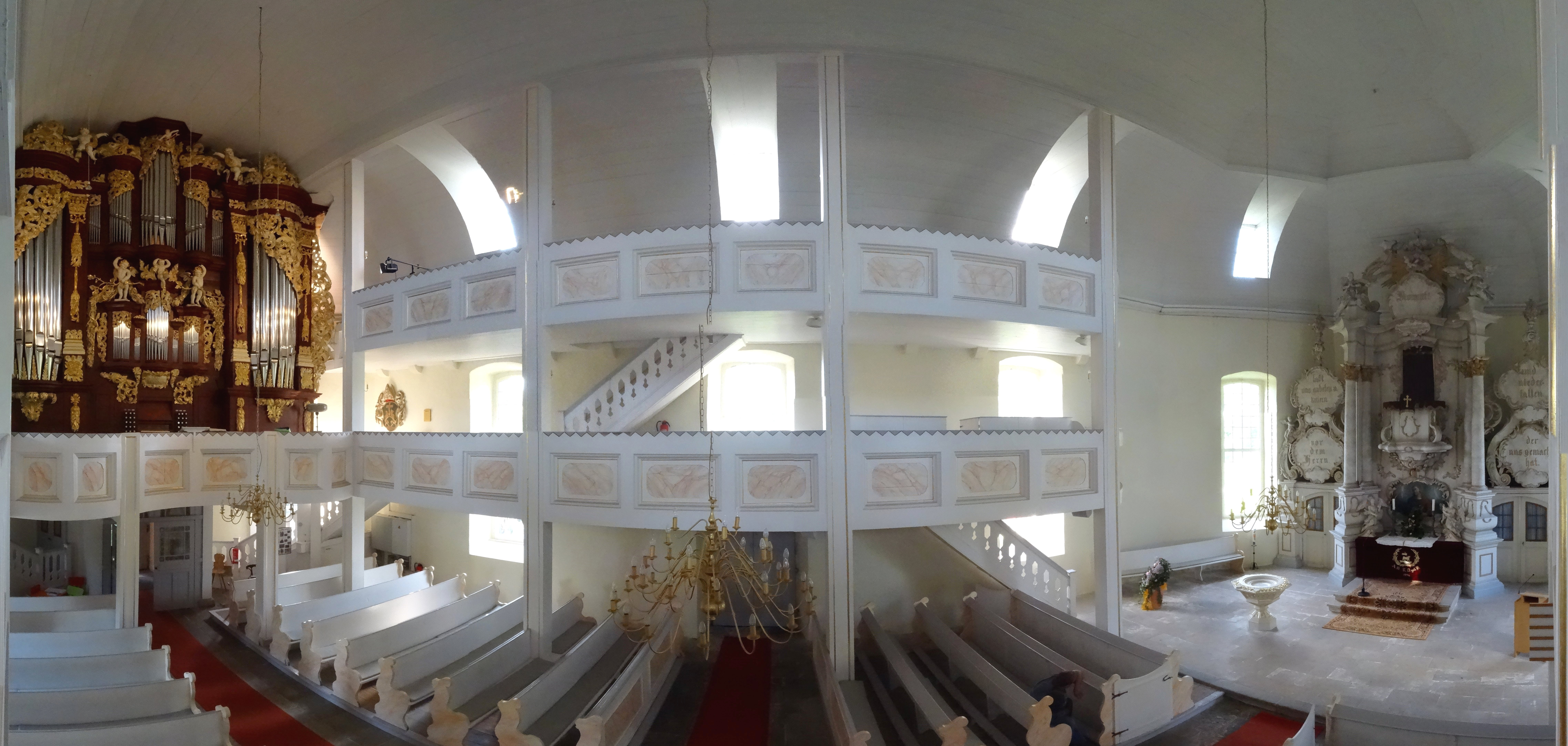 Innenraumpanorama St. Petri (Büßleben)